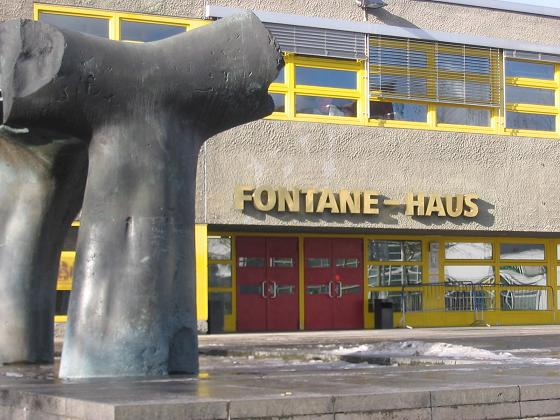 Märkisches Viertel, Berlin, Fontanehaus im Zentrum Selbst fotografiert, Februar 2005 --Lienhard Schulz 19:13, 1. Feb 2005 (CET) GNU FDL